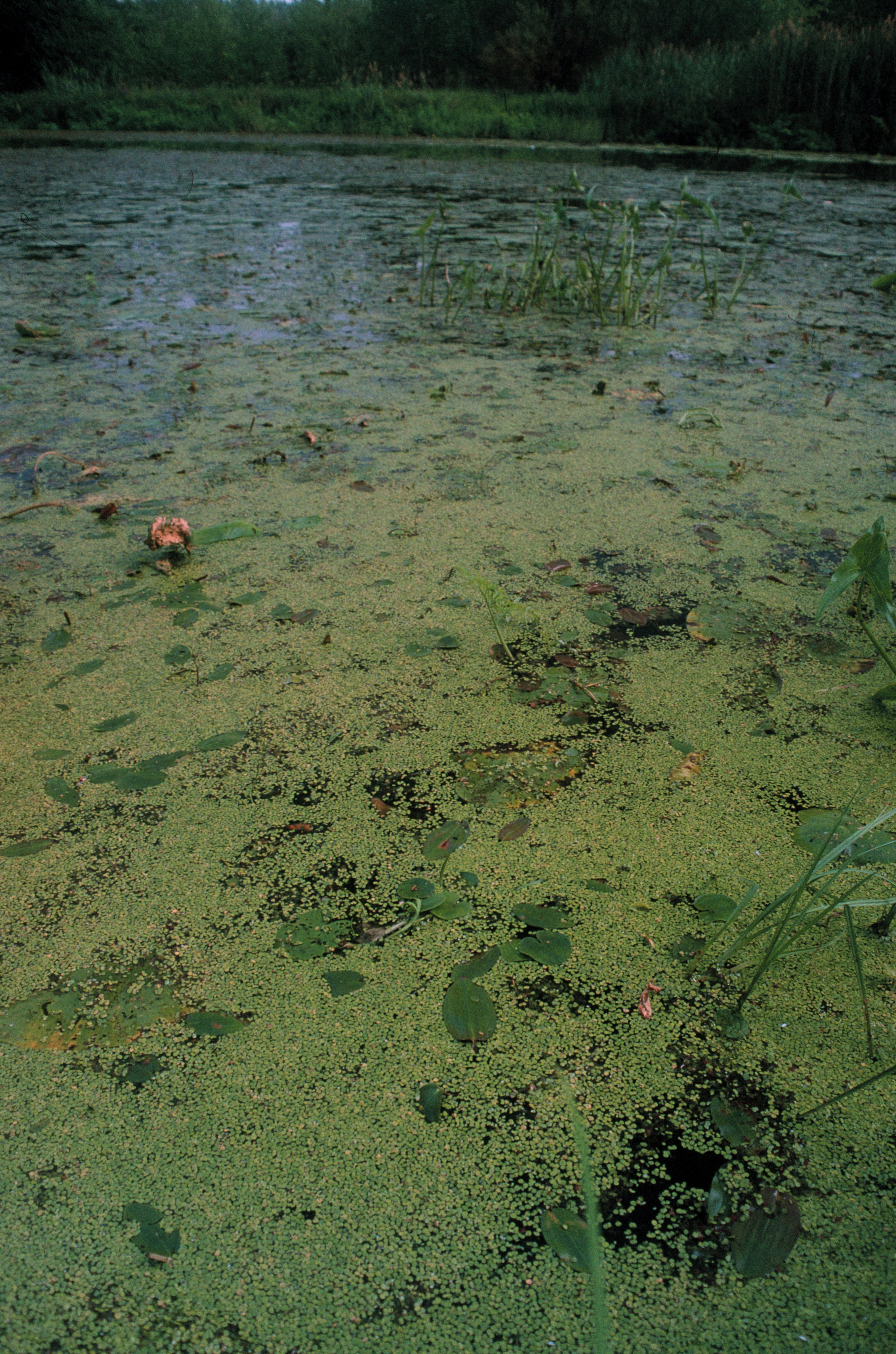 Limaskaa